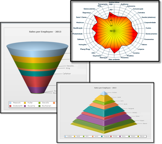 ScriptCase cria automaticamente gráficos nos seus relatórios em tempo real e exibe diretamente no seu navegador. Nova funcionalidade de gerar os gráficos em HTML5 nas aplicações de consulta. Agora também é possivel gerar aplicaçõe que exibem apenas o gráfico sem a necessidade de navegação da grid de dados para a página do gráfico.